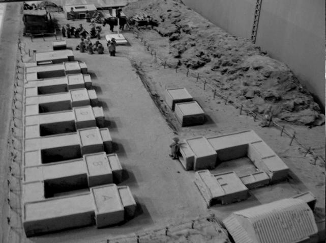 בתמונה רואים דגם של מחנה ג'אדו בלוב. המחנה הוקם כמחנה ריכוז/עבודה על ידי הגרמנים במלחמת העולם השנייה.